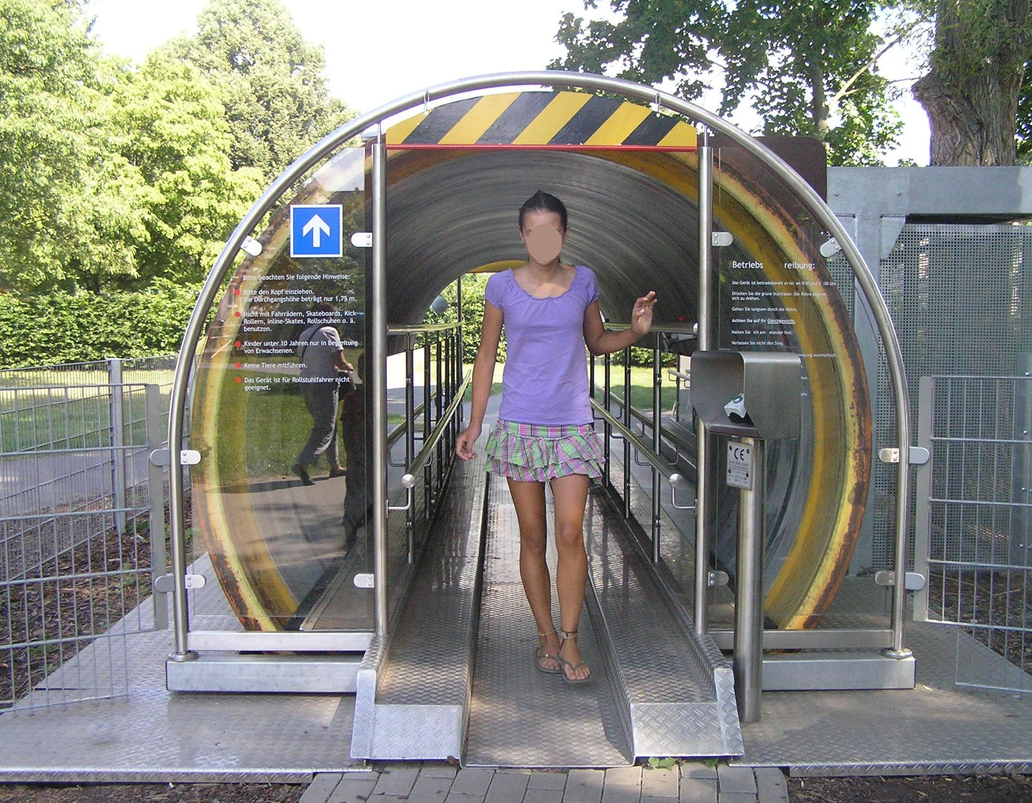 Die Station "Optokinetisches Gleichgewicht", ein Teil des Optikparcours in Wetzlar